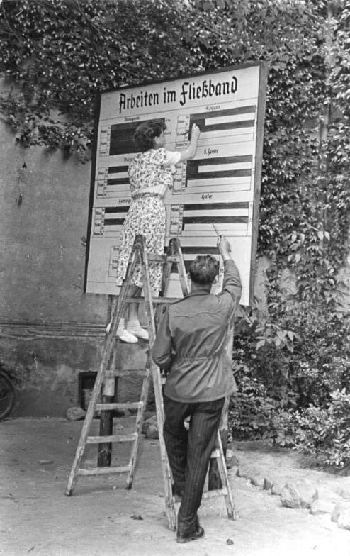 LPG Schenkenberg, Aktualisierung der Leistungstafel Zentralbild Illner-Me-Ho.xx-31.7.1953 Mit großem Arbeitseifer sind die Genossenschaftsbauern der Produktionsgenossenschaft "7. Oktober" in Schenkenberg, unterstützt durch die MTS Döbernitz, mit dem Einbringen der Roggenernte beschäftigt. Alle Arbeitsgänge sind mechanisiert und werden nach dem sowjetischen Fließsystem durchgeführt. Das heißt ohne Unterbrechung mäht und drischt der "Stalinag 4", werden die Kürner abgefahren, das Stroh gepreßt, die Felder nachts geschält und am anderen Morgen die Zwischenfrucht gedrillt. UBz: Auf dem Brigadenhof steht die große Leistungstafel über den Ernteeinsatz im Fließsystem, und täglich trägt die Buchhalterin Renate Hartwig den Stand der Erntearbeiten und des Zwischenfrucht-Anbaues ein.